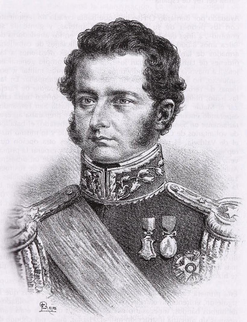 Bernardo O´Higgins por Luis Fernando Rojas.